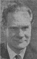 Sven Månsson